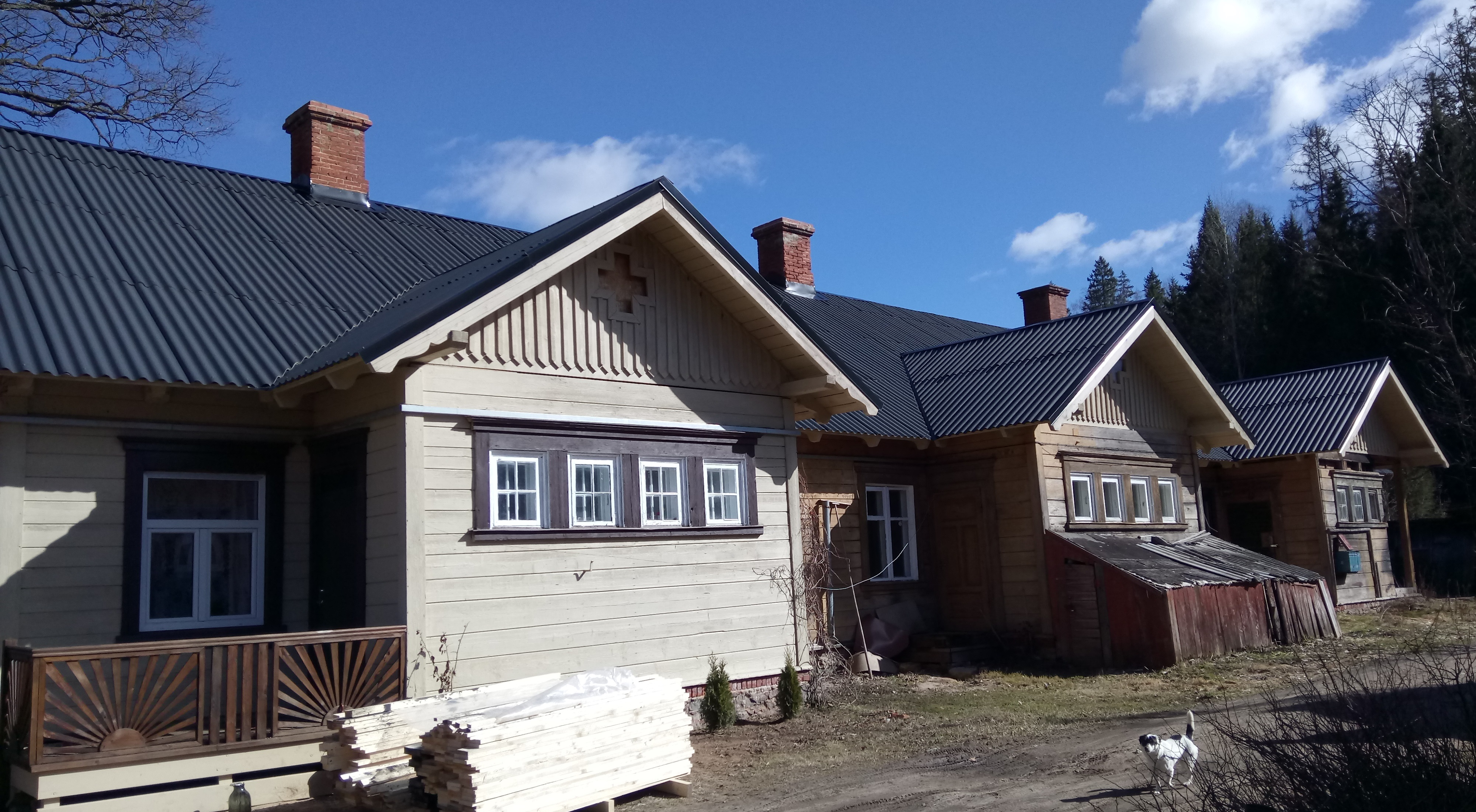 Zaķusalā esošās dzīvojamās ēkas